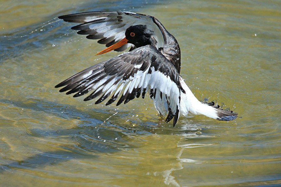 Badender Austernfischer an der Müritz